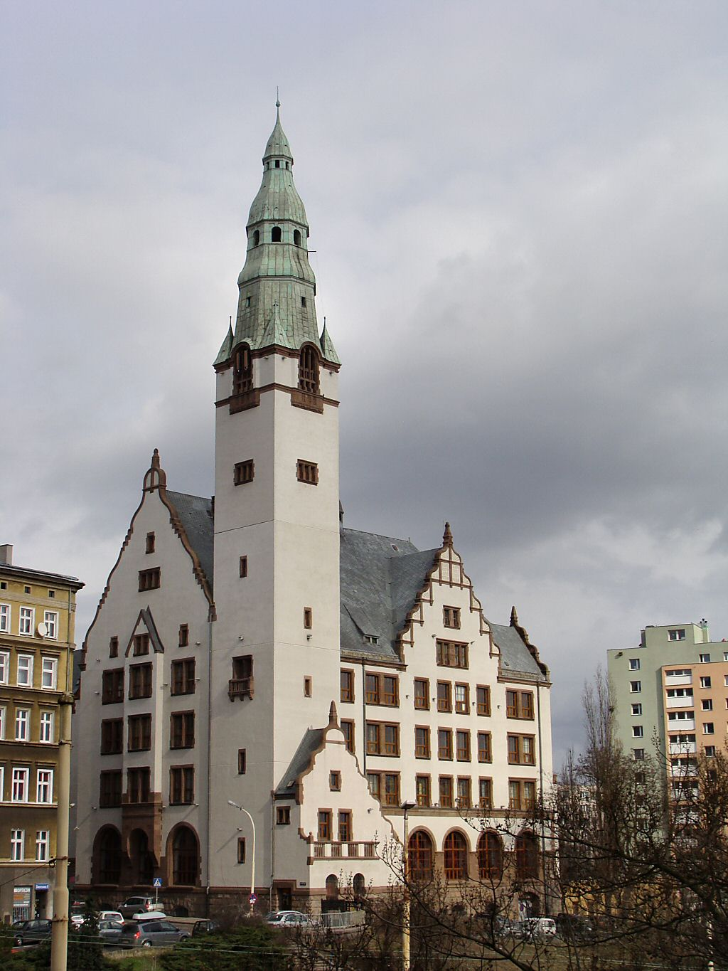 Gmach Rektoratu Pomorskiej Akademii Medycznej w Szczecinie